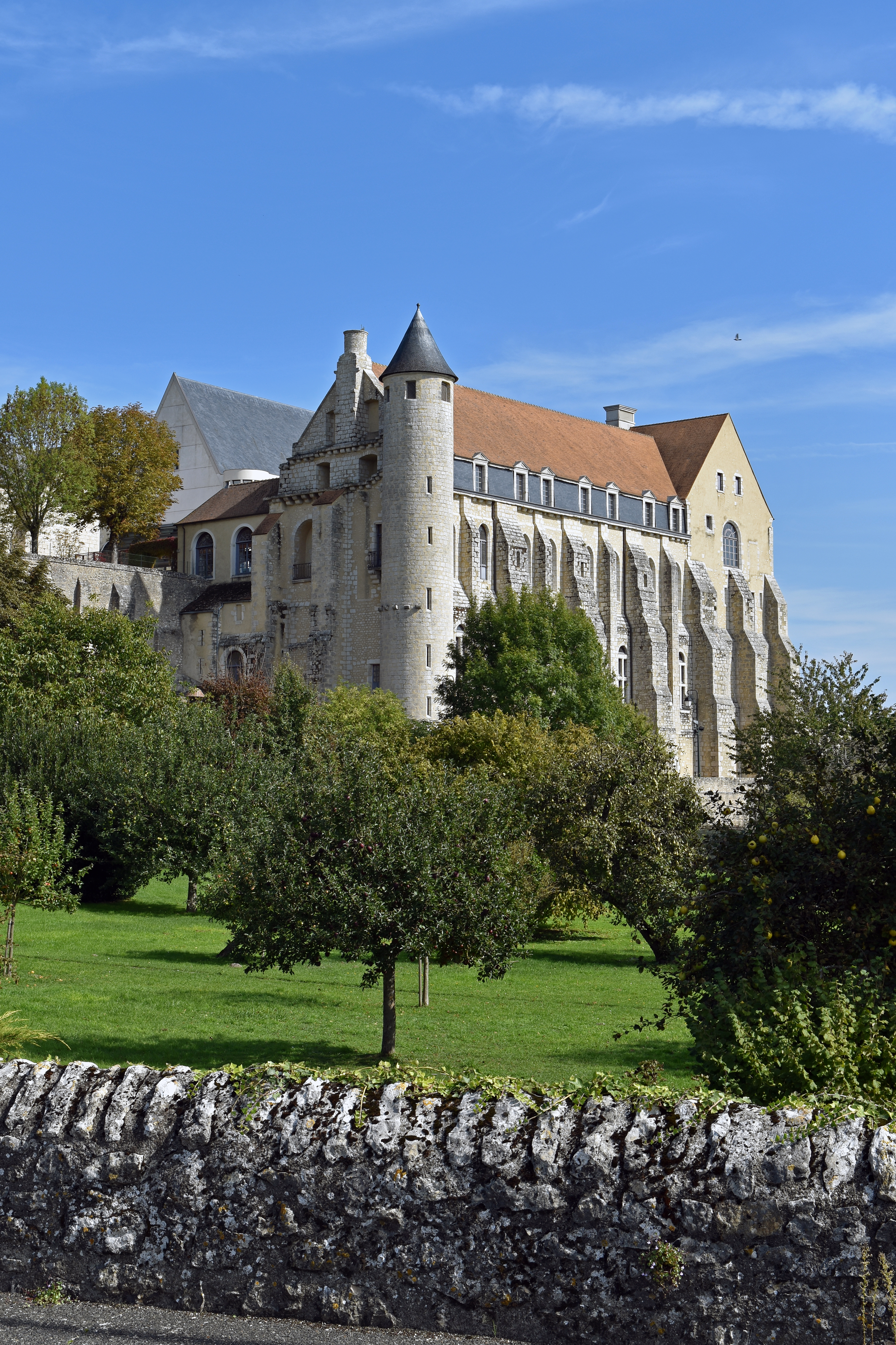 Abbaye Saint-Séverin de Château-Landon, Seine et Marne, France